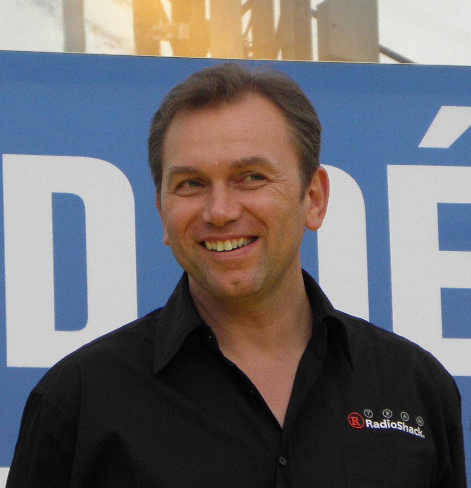 Johan Bruyneel in 2010